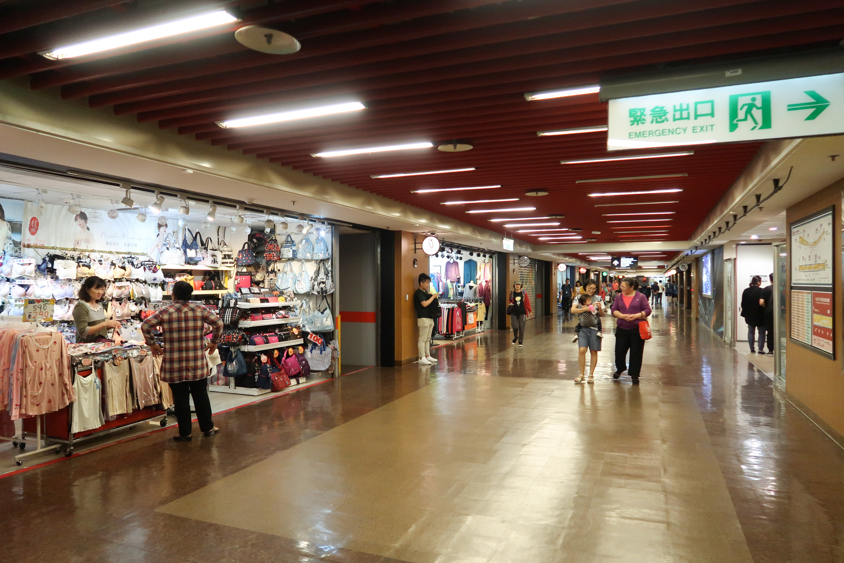 Zhongshan Metro Mall